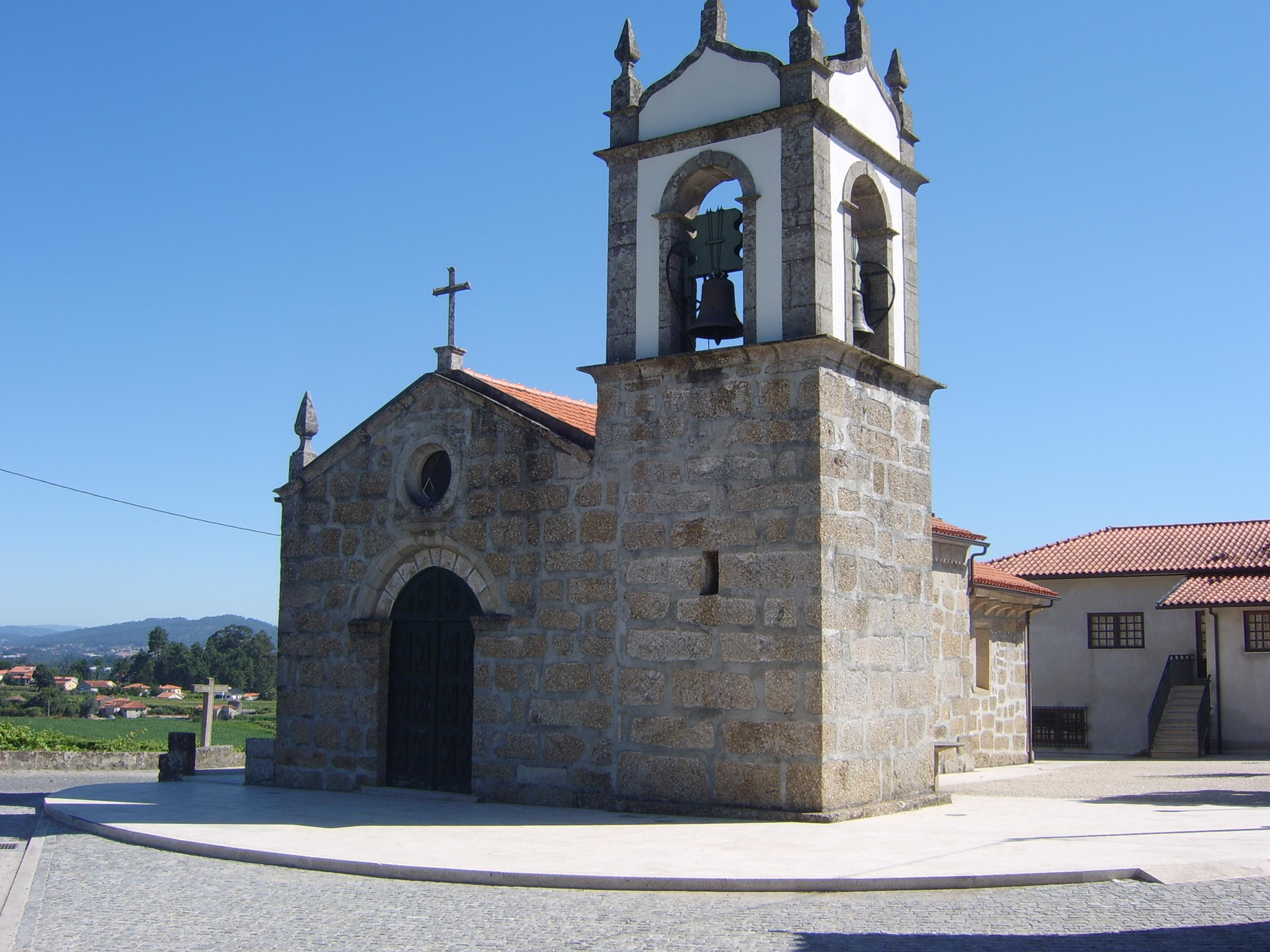 igreja